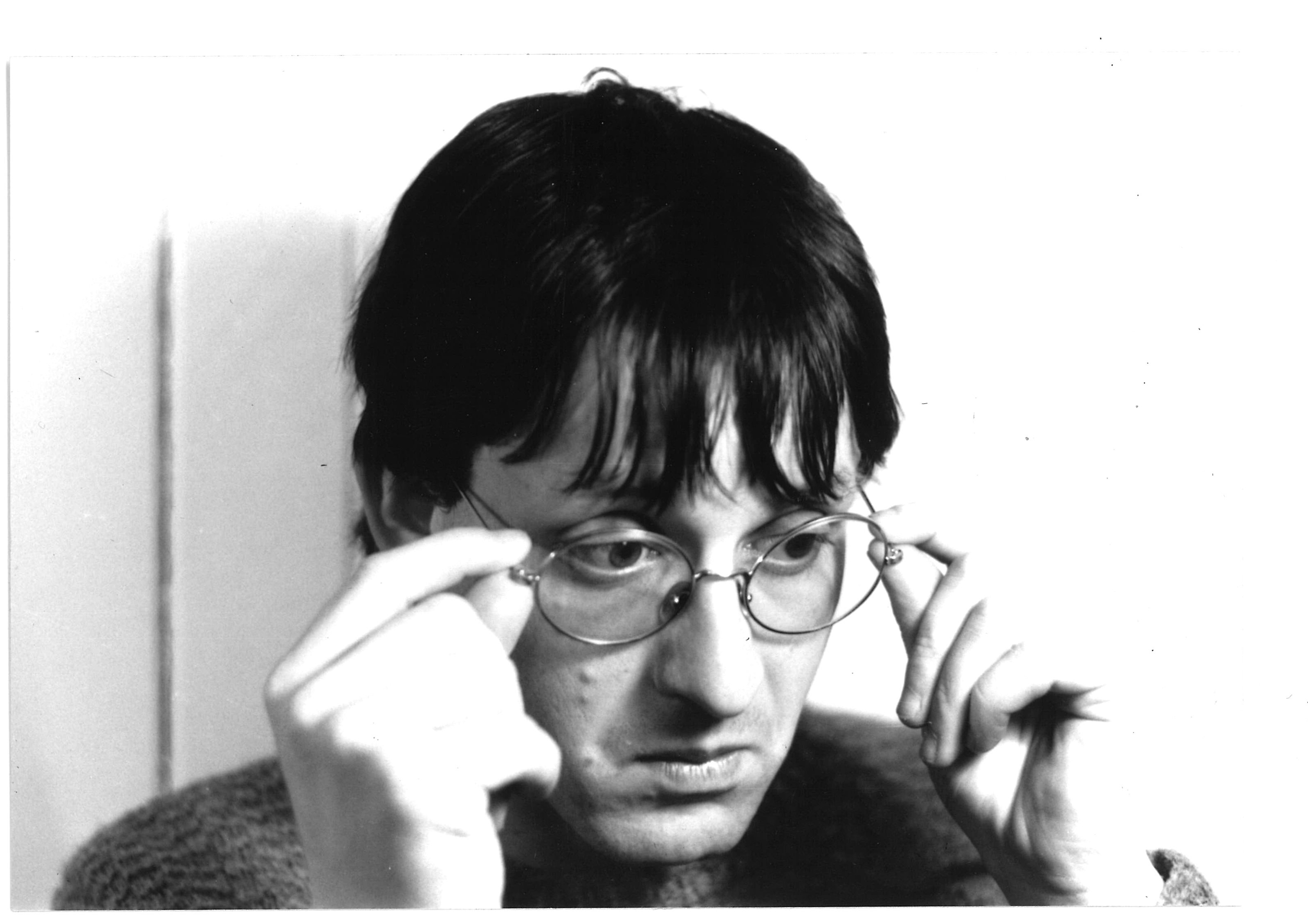 Franz Müller, Ideeartist.